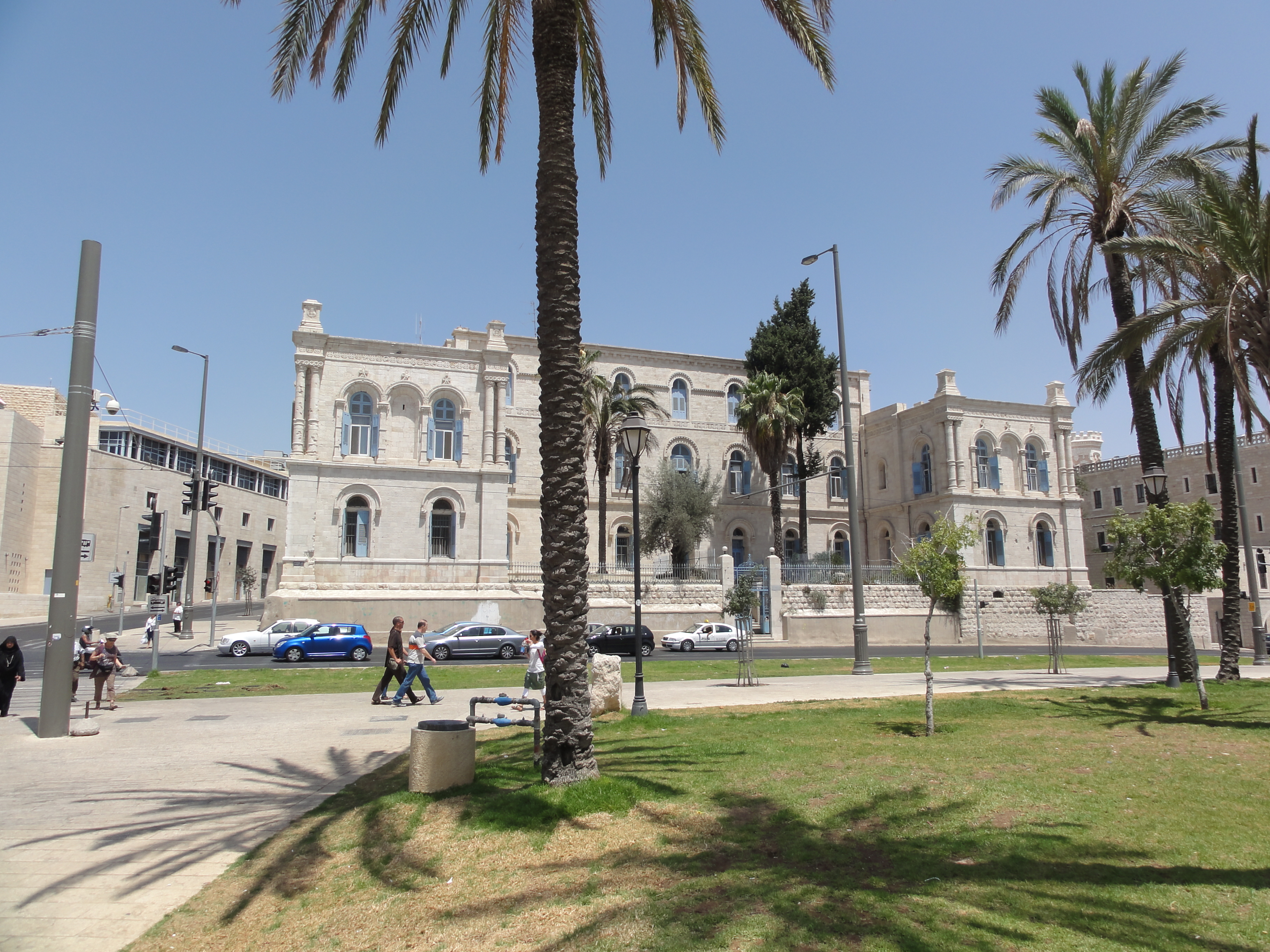 Saint Louis Hospital, Jerusalem